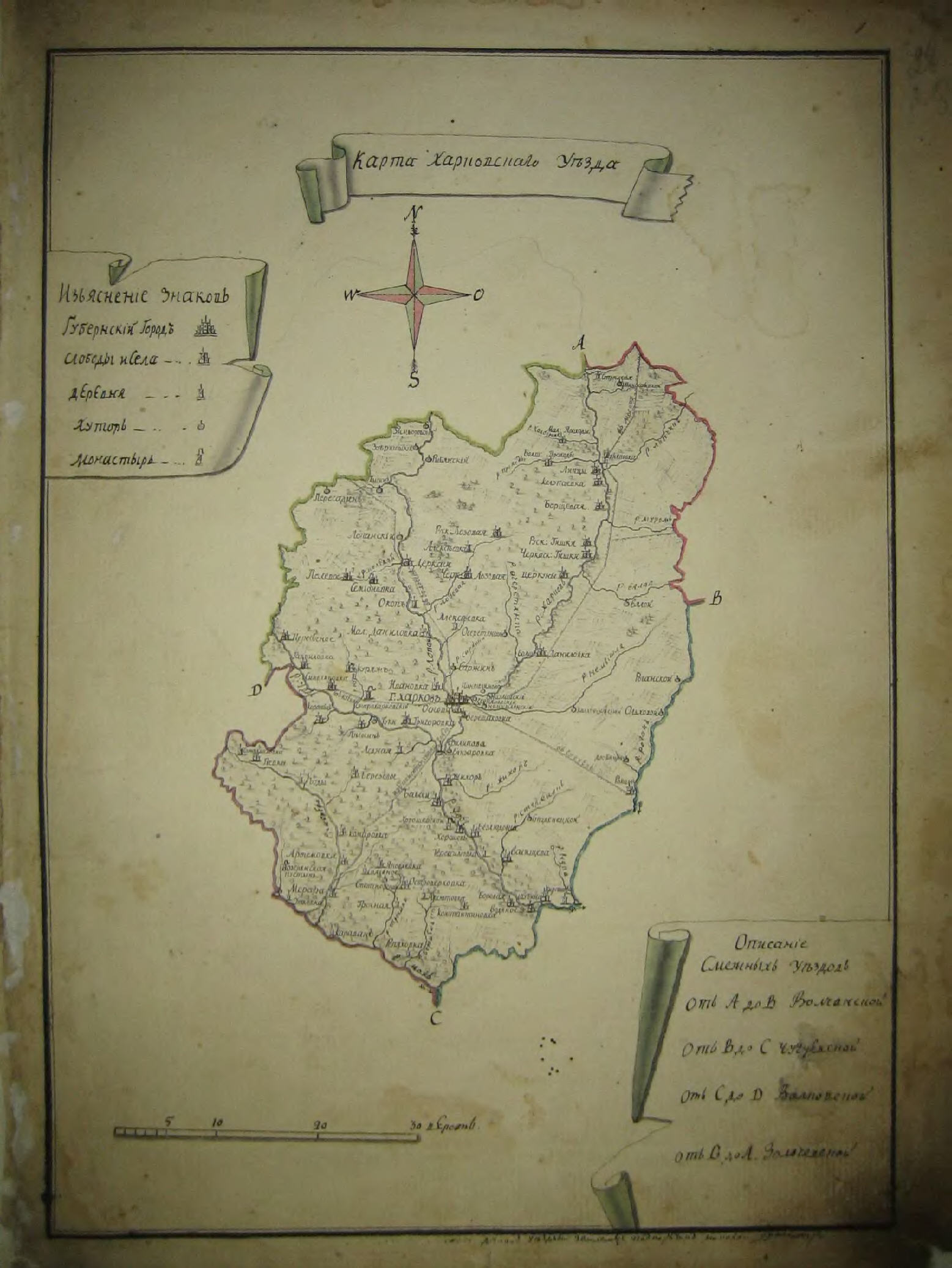 Харківське намісництво. Мапа Харківського повіту з альбому мап намісництва. 1787 рік.